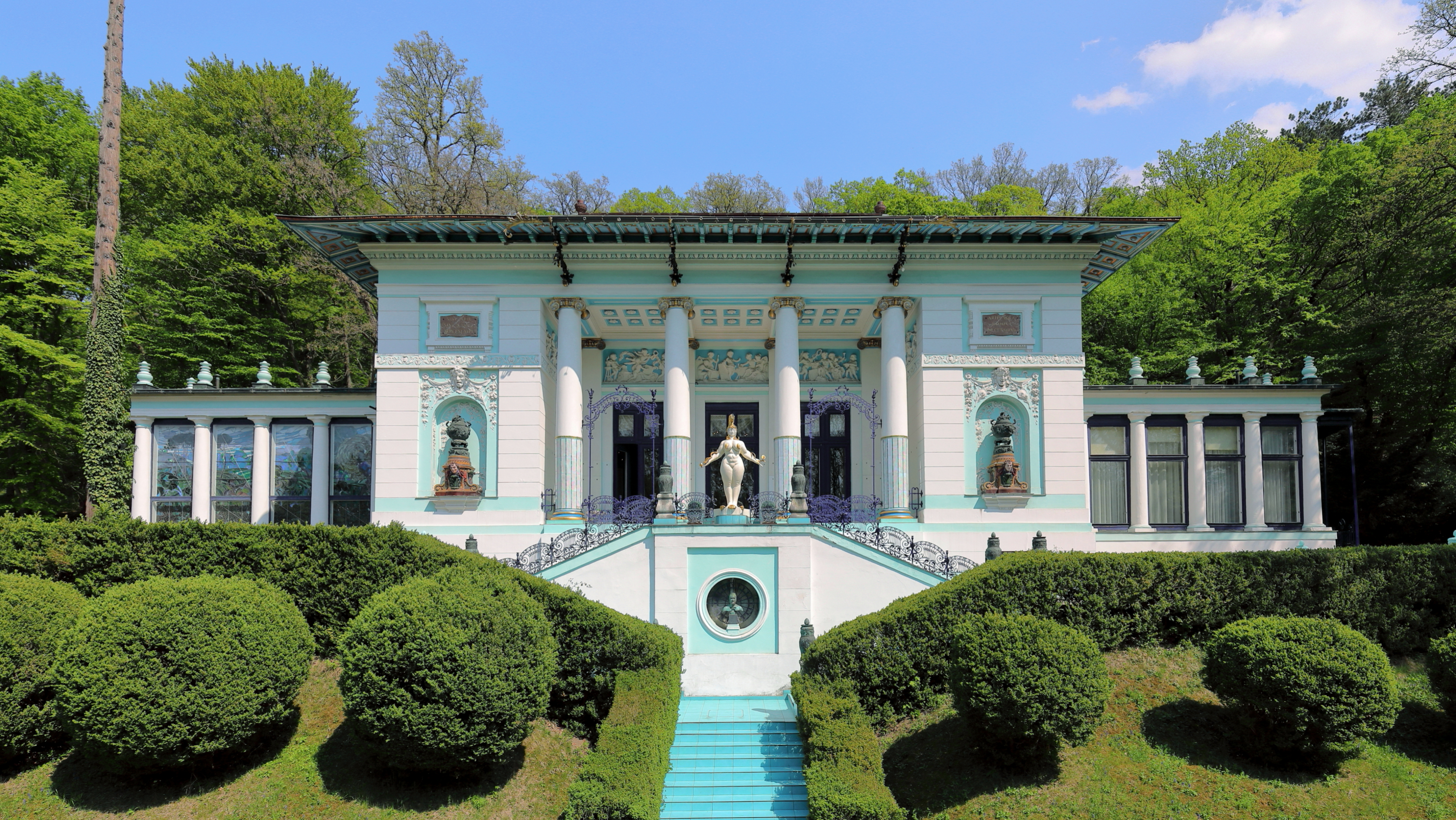 Die Otto-Wagner-Villa an der Adresse Hüttelbergstraße 26 im 14. Wiener Gemeindebezirk Penzing.Die Villa hat der Architekt Otto Wagner von 1886 bis 1888 zum eigenen Gebrauch errichtet. Die linke Pergola wurde 1900 zum Atelier umgebaut. 1911 verkaufte er die Villa und errichtete sich eine neue an der Adresse Hüttelbergstraße 28. Im Jahr 1972 erwarb der Maler Ernst Fuchs das Gebäude und wird (Stand 2018) als Ernst-Fuchs-Museum genutzt.